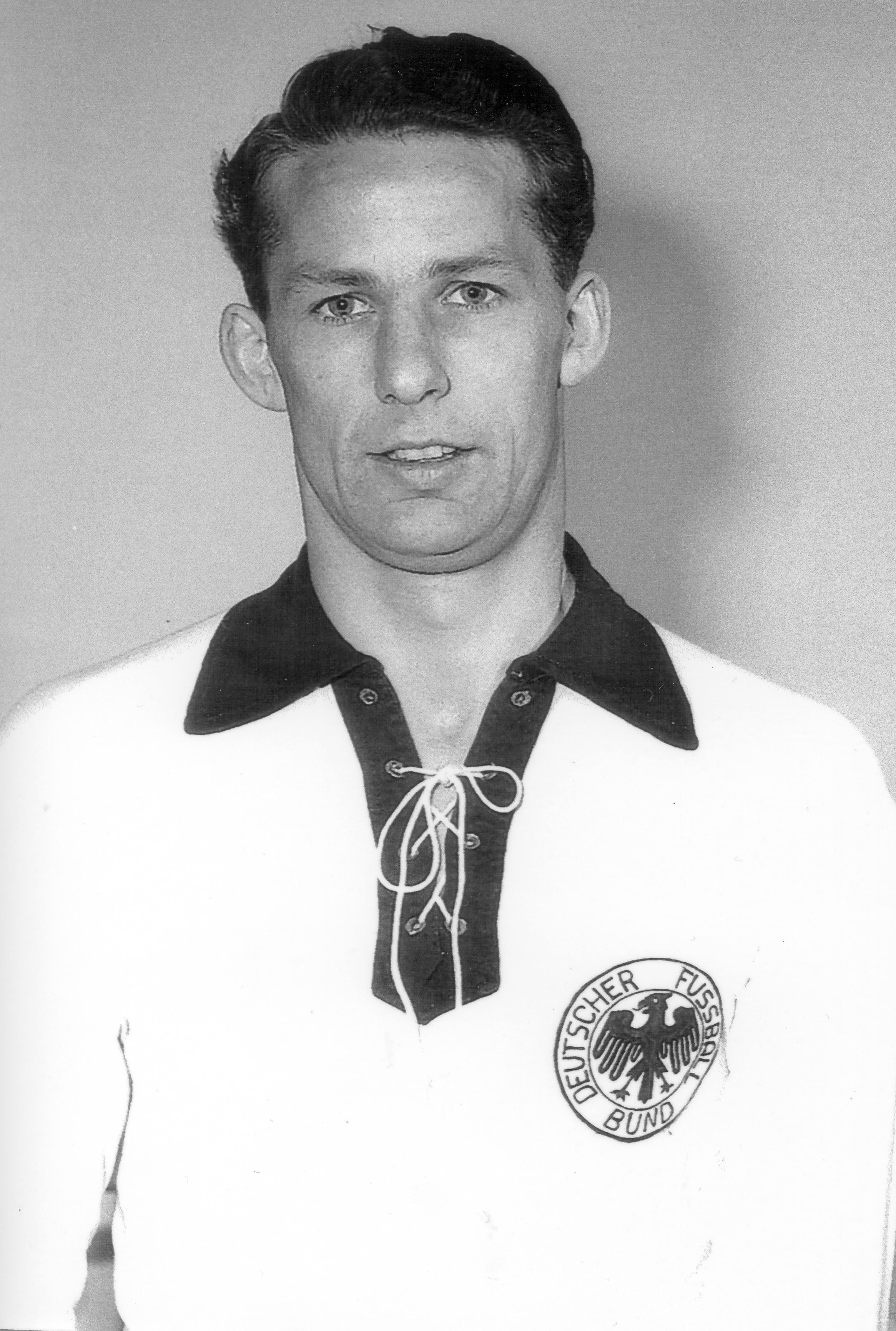 Fußballspieler Willi Gerdau (1929 - 2011)